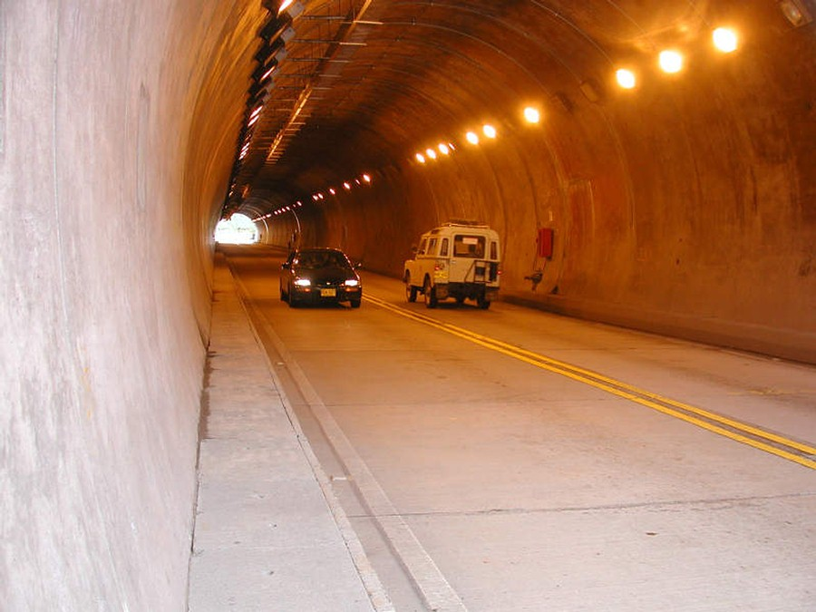 Tunel Bijagual en la Autopista Bogotá-Villavicencio